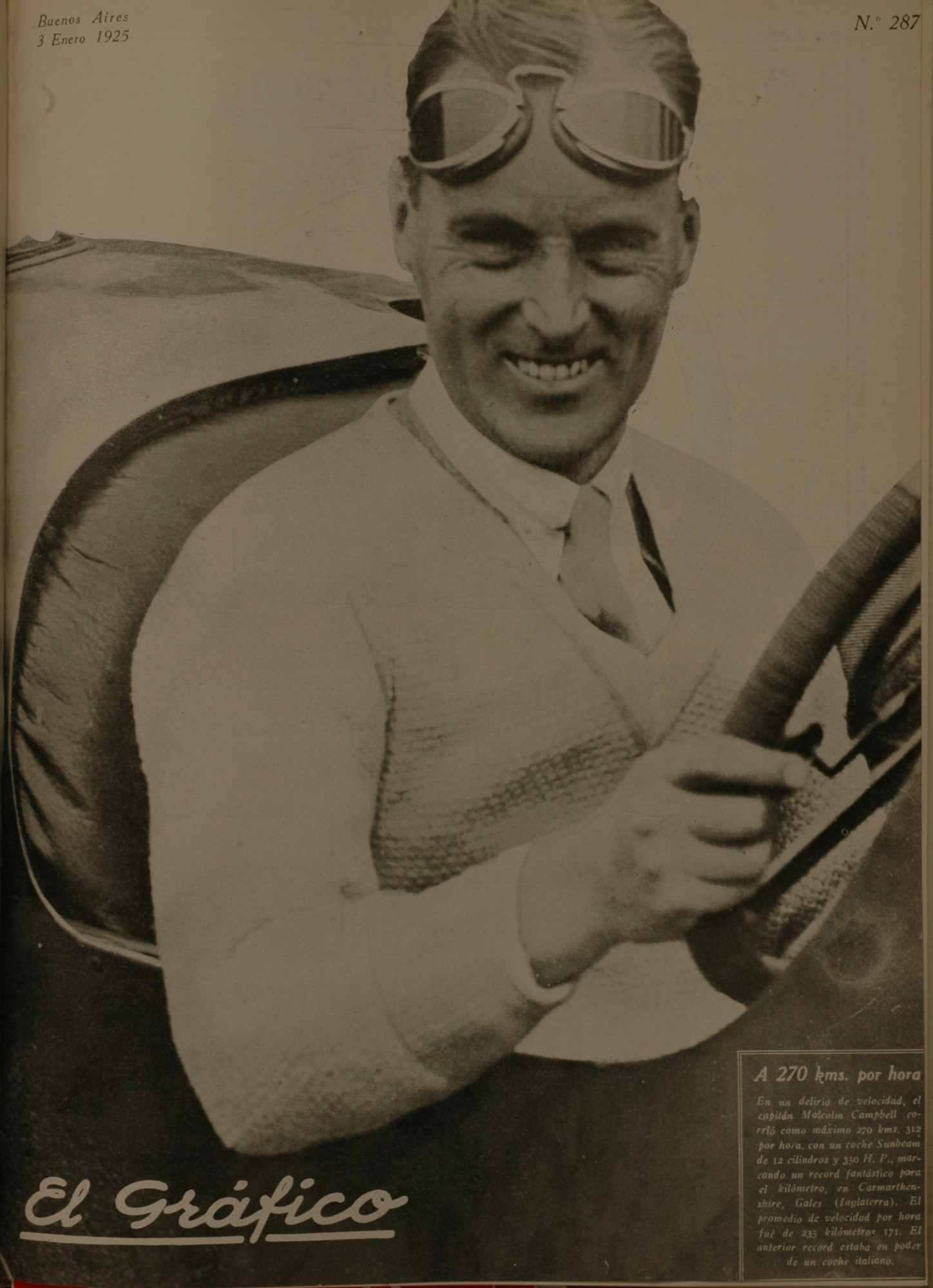 El Grafico del 03 de Enero de 1925. Edicion 287